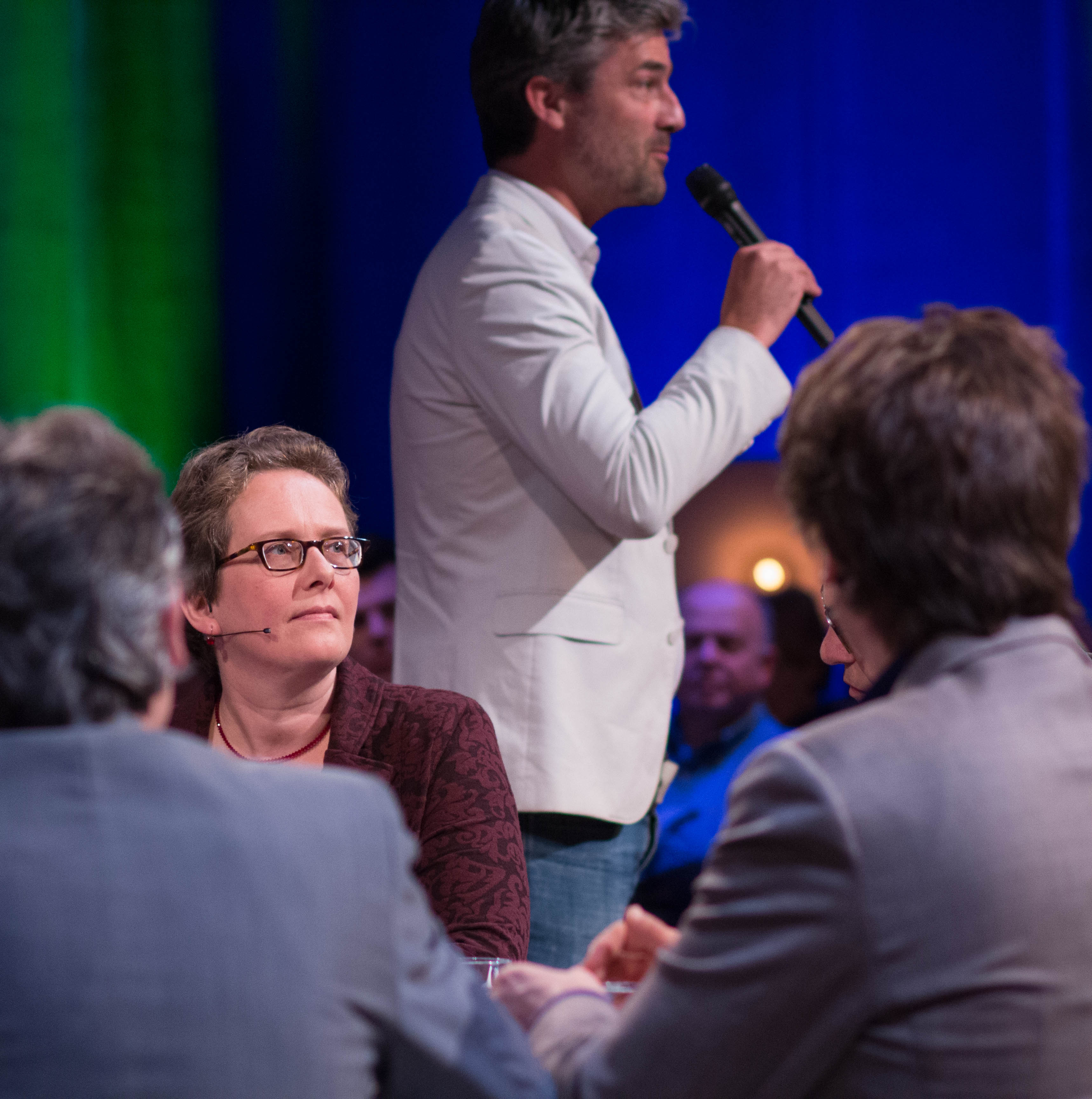 tijdens opnames van Het Filosofisch Kwintet tijdens het Brainwash Festival 2014